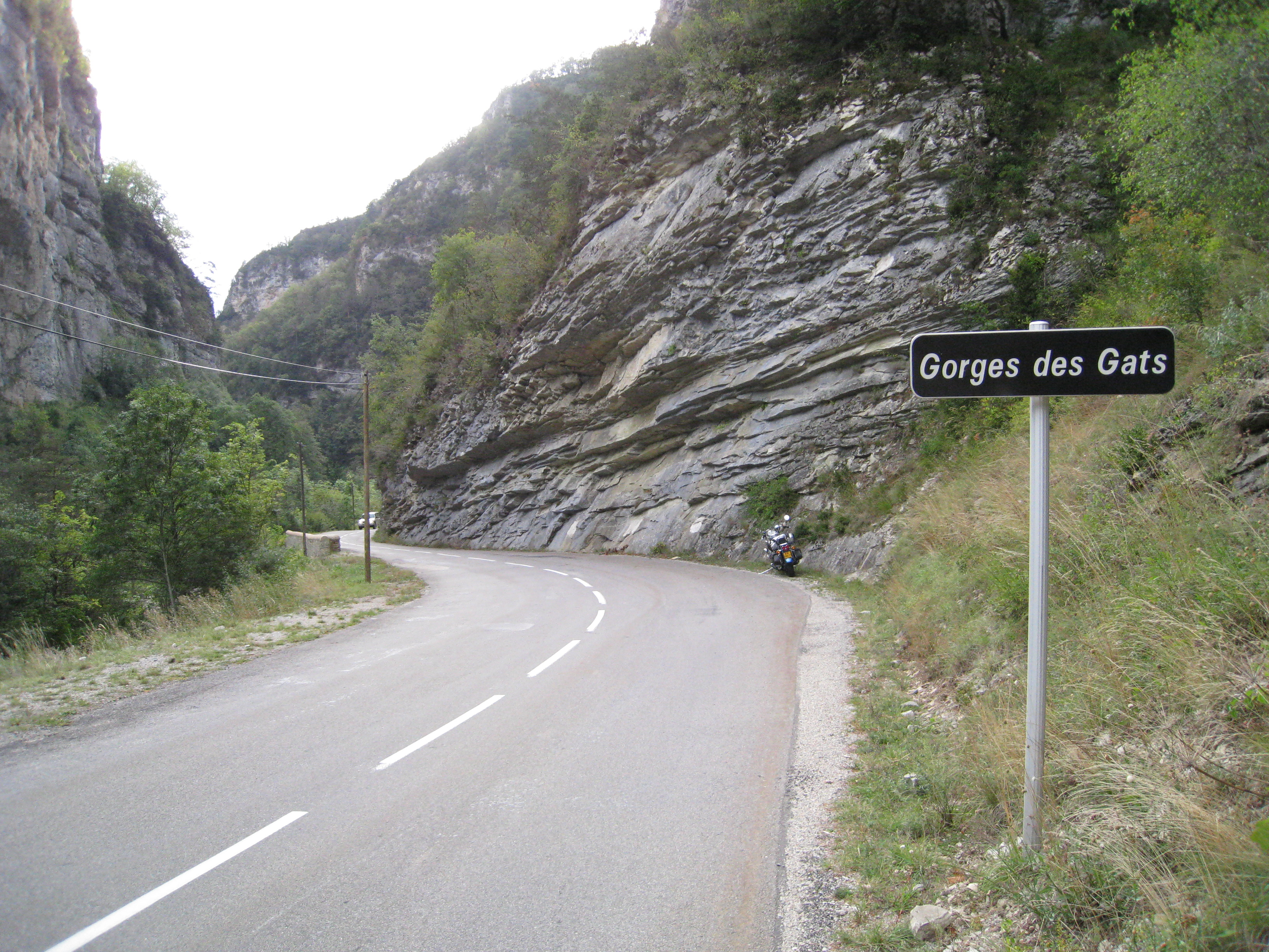 Gorges des Gats, Glandage, Drôme, France